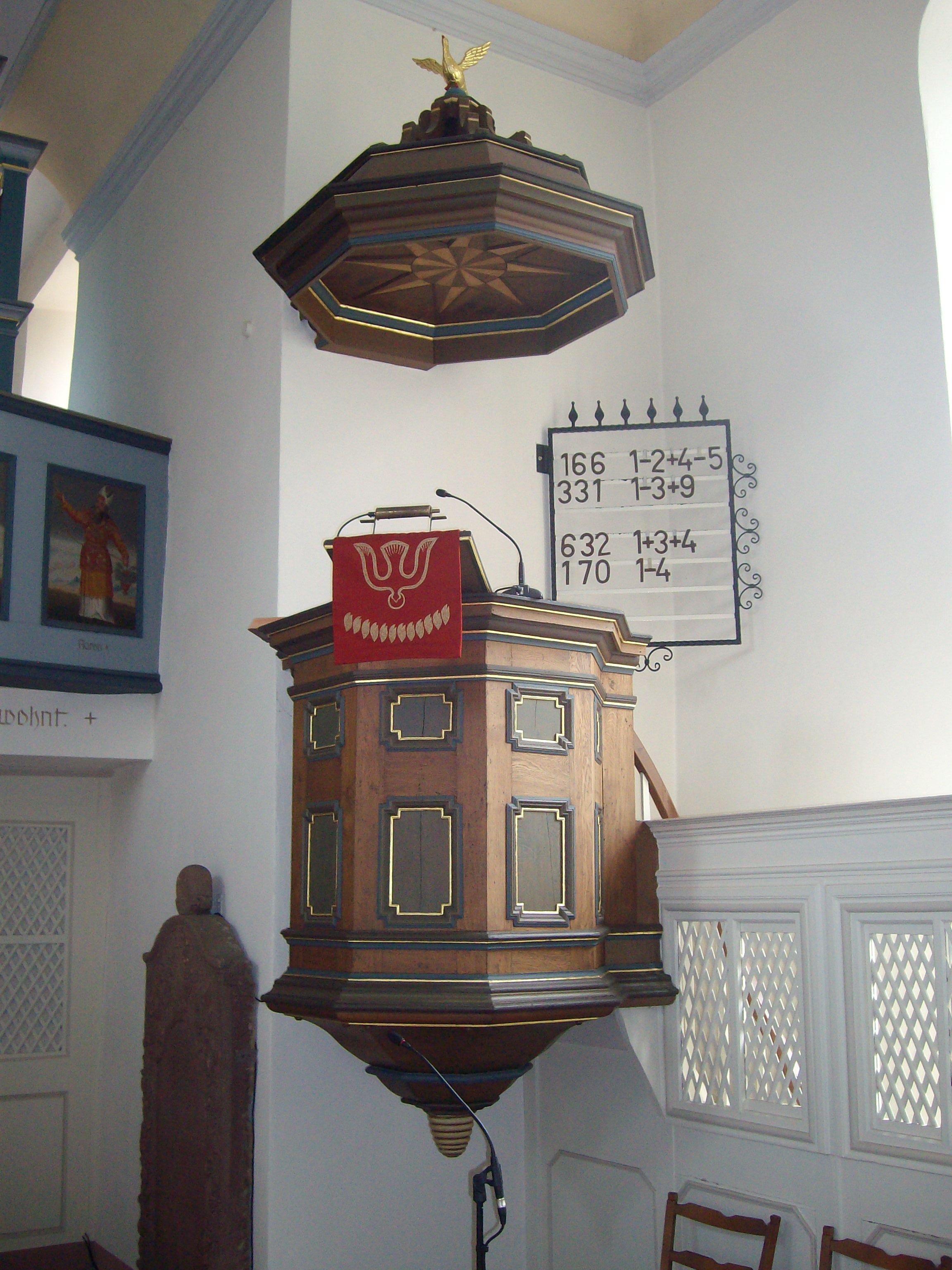 Kanzel der Evangelischen Kirche Wetterfeld, Laubach, Landkreis Gießen, Hessen, Deutschland